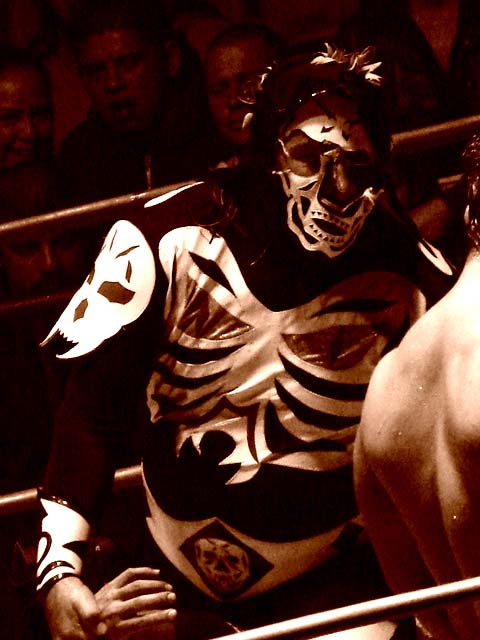 La Parka